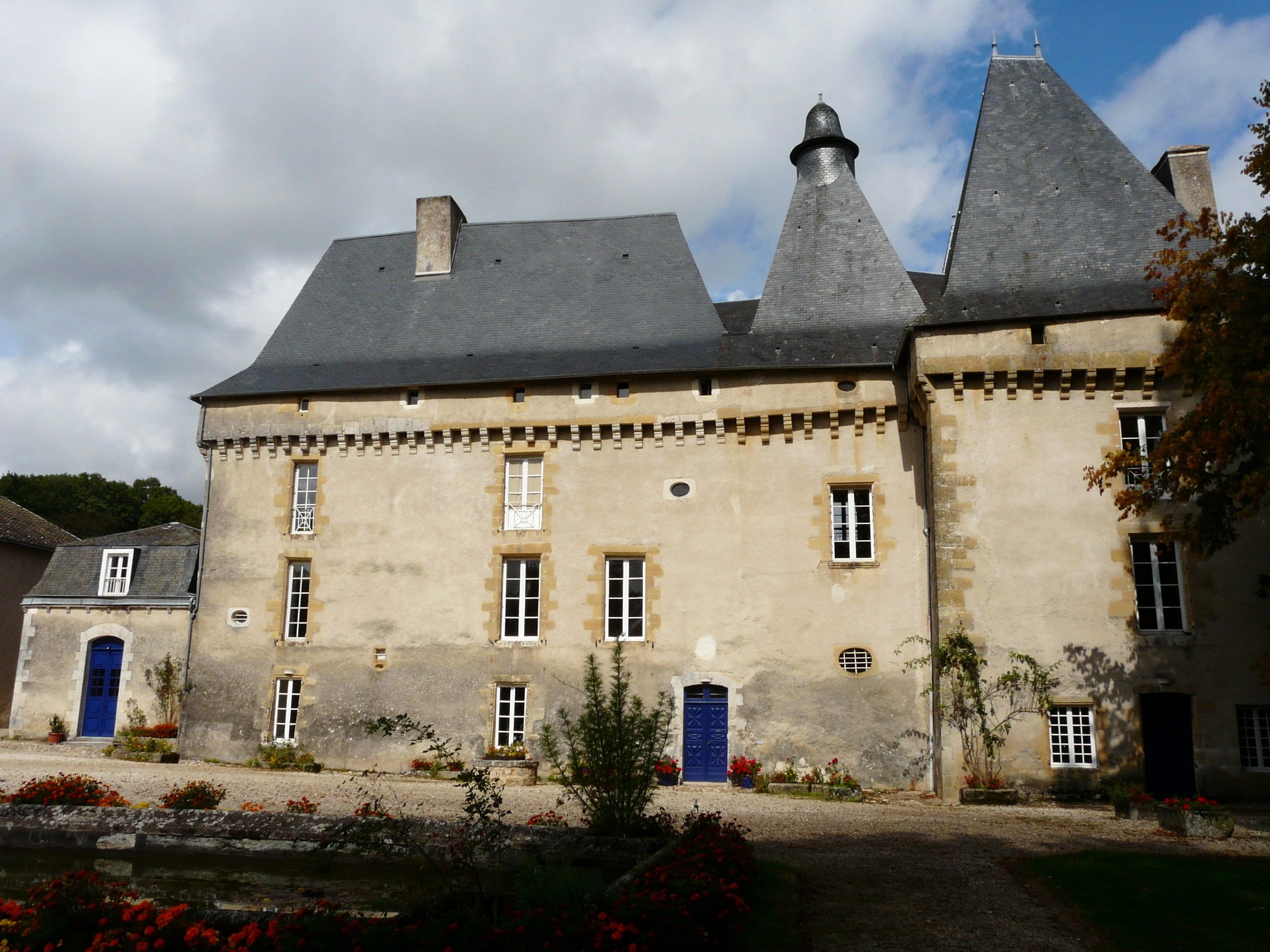 La façade sud du château de Mavaleix, Chalais, Dordogne, France